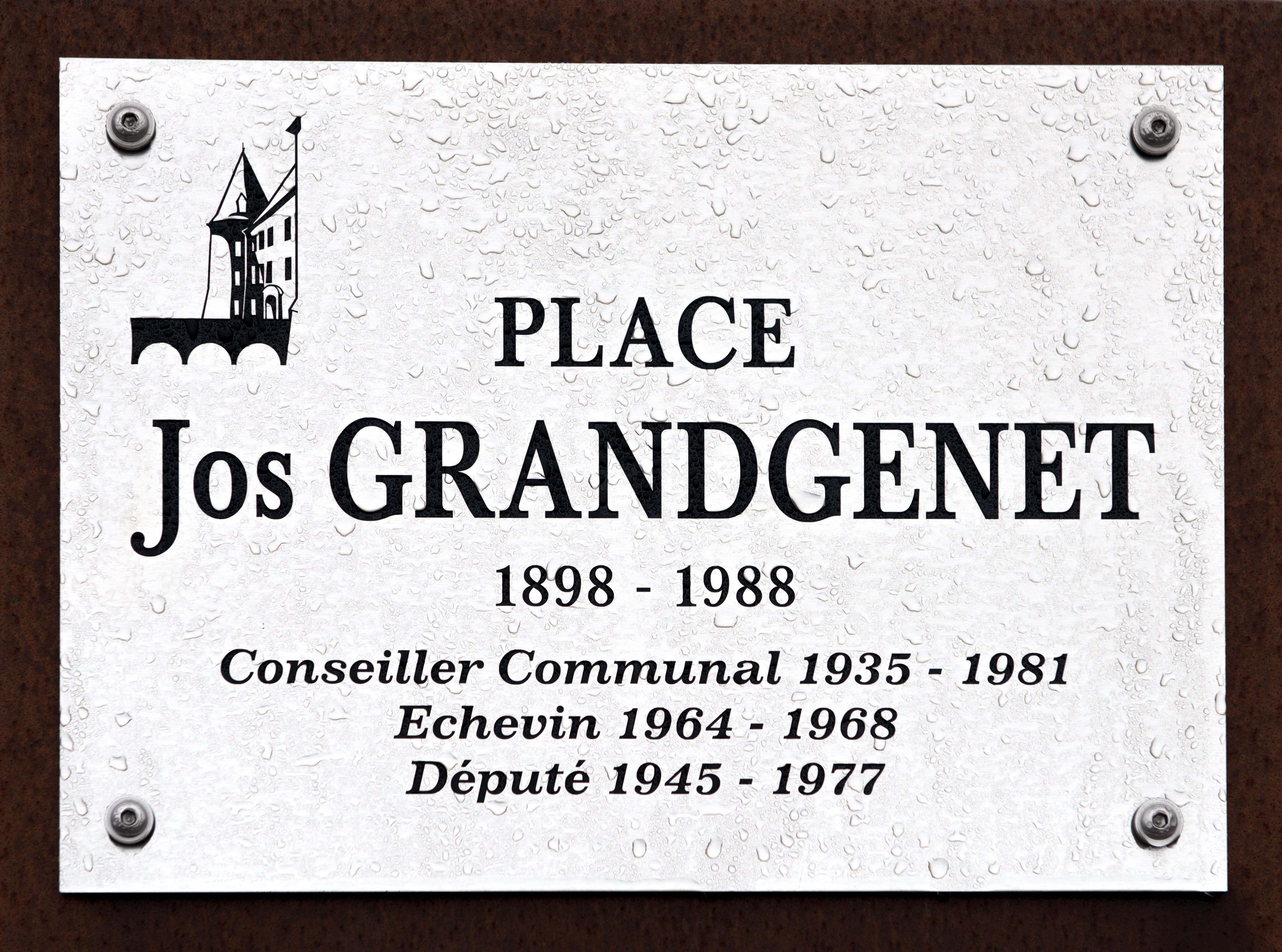 D'Plack op der Jos-Grandgenet-Plaz zu Bieles, se gouf 2012 vis-à-vis vu sengem fréieren Heemechsthaus ubruecht.